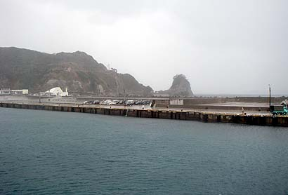 Niijima Port, Niijima, Tokyo, Jp